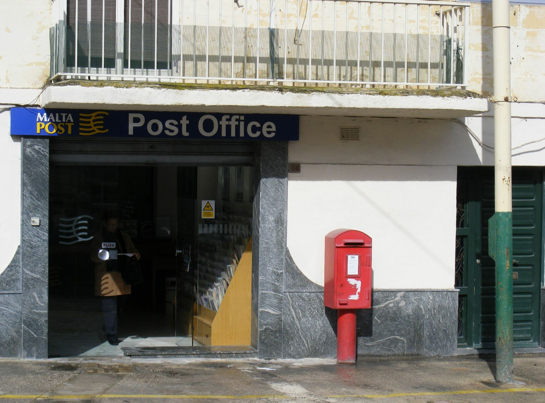 Malta. Birzebuggia Post Office.